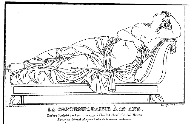 La Contemporaine a 19 ans, Apres un marbre de Lemot, 1797